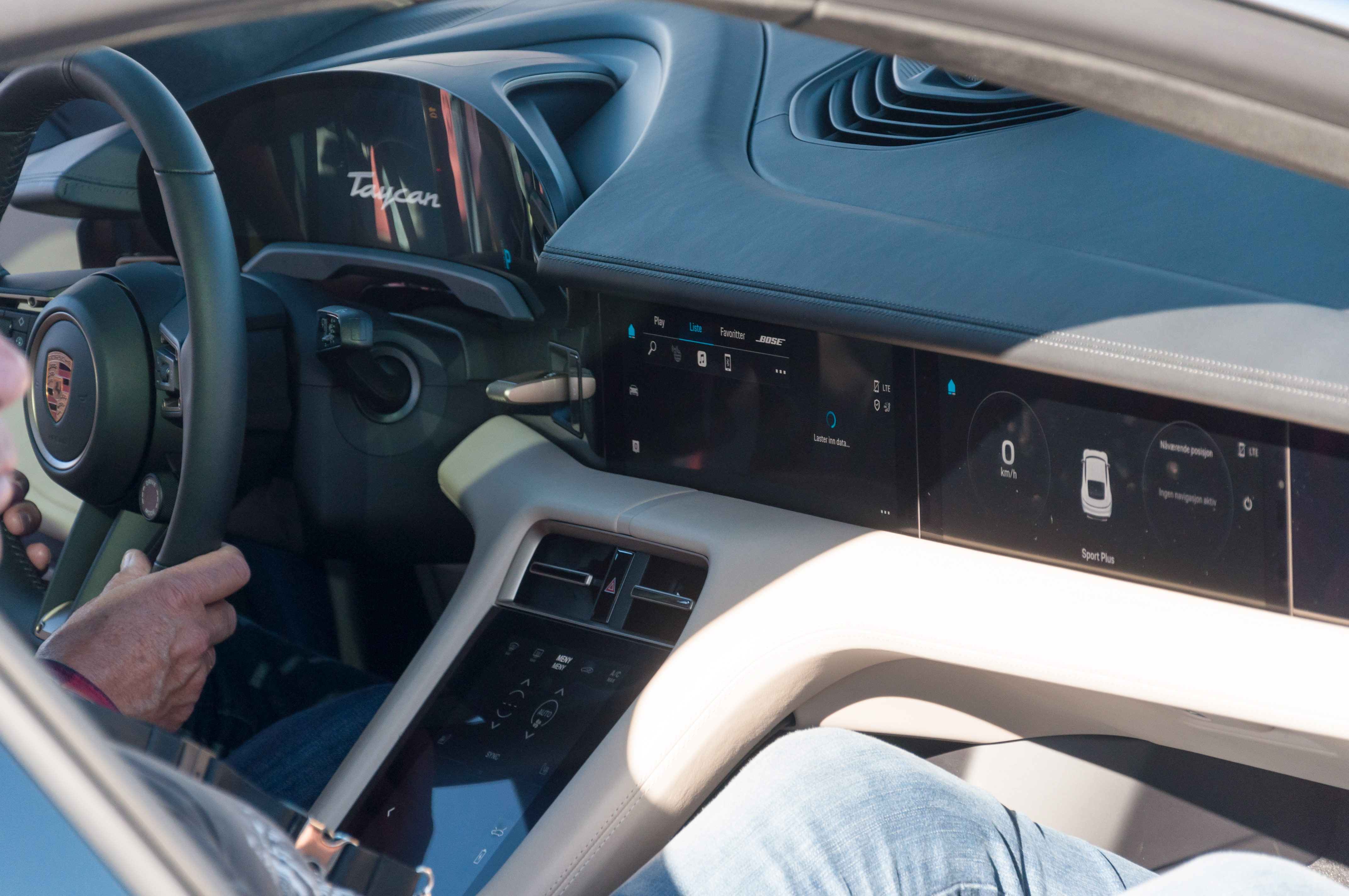 Rudskogen 2019